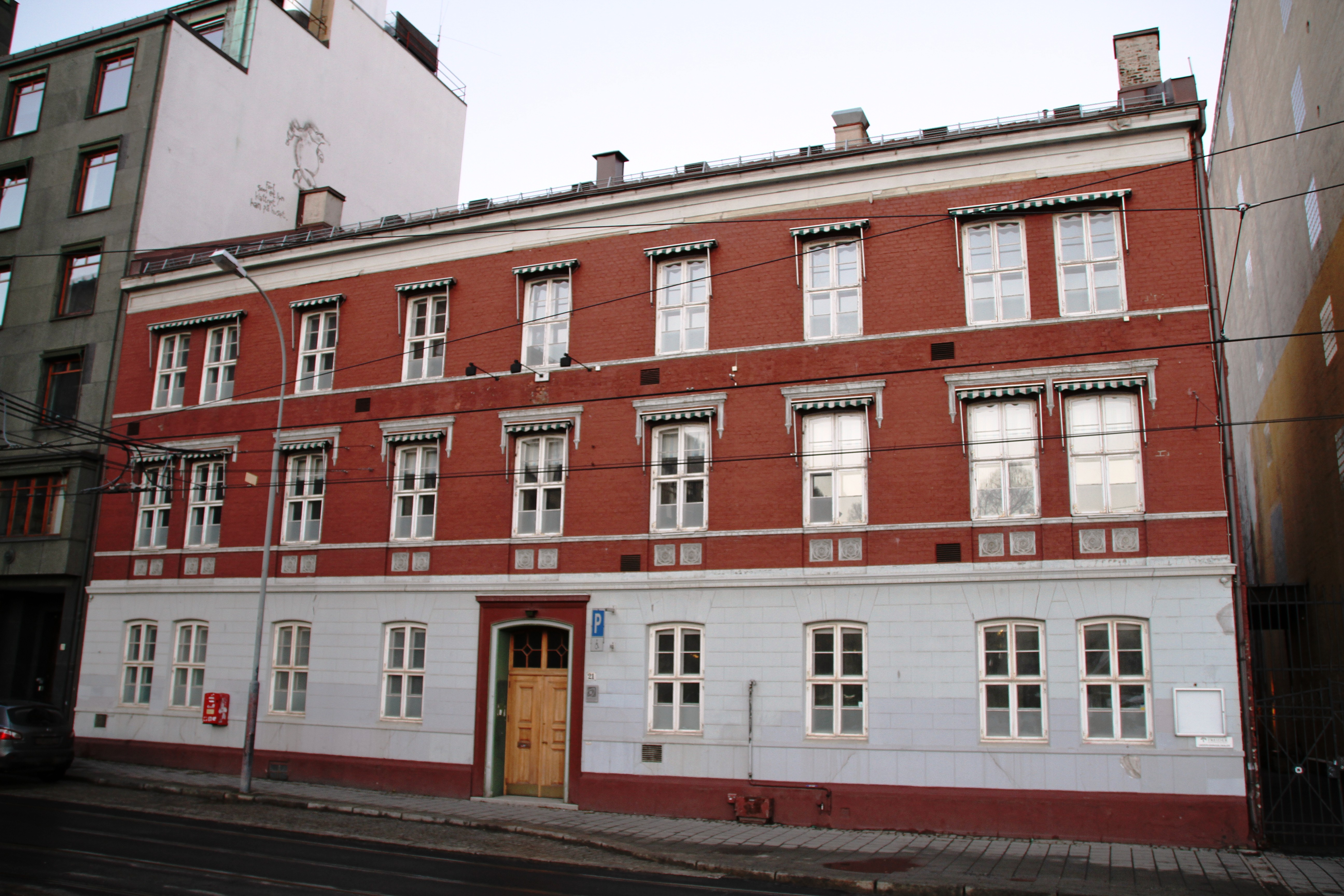 Kristian Augusts gate 21, Oslo